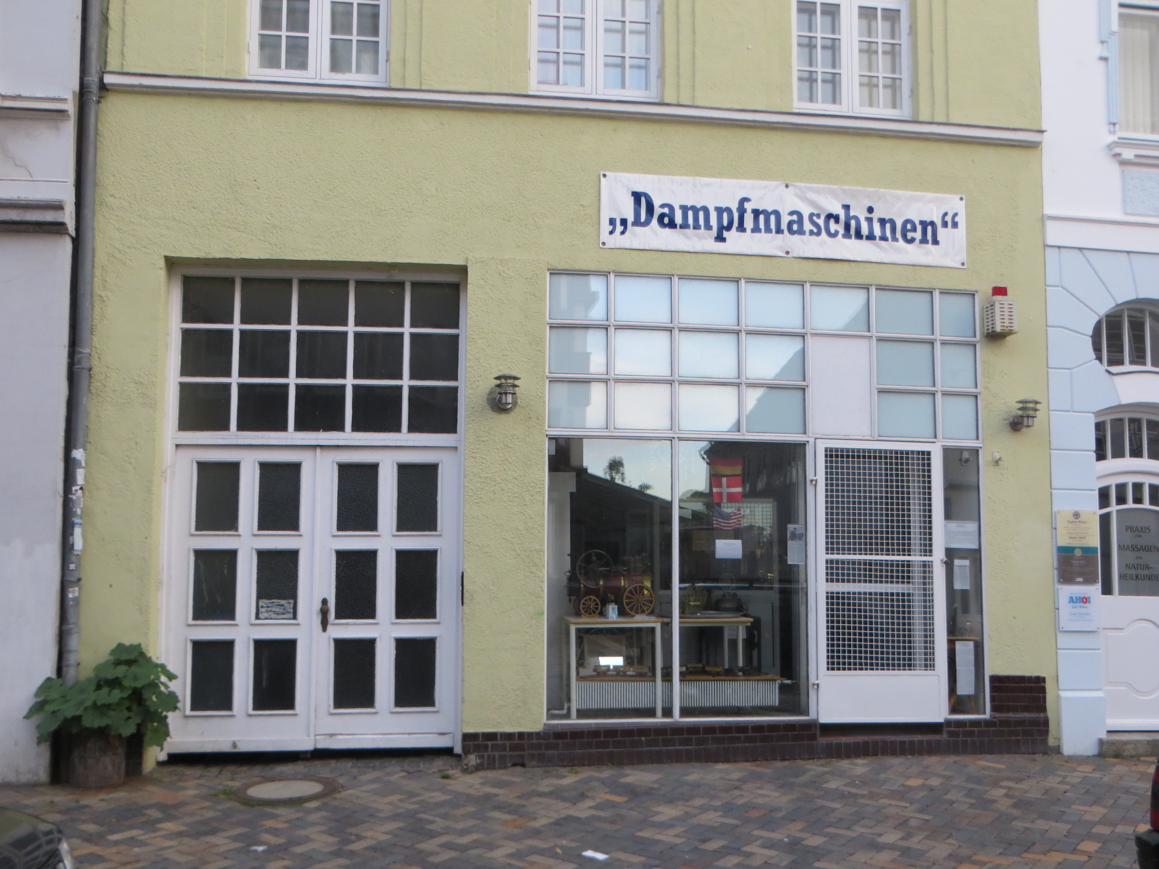 Dampfmaschinen-Museum (Flensburg 2014), Bild 05